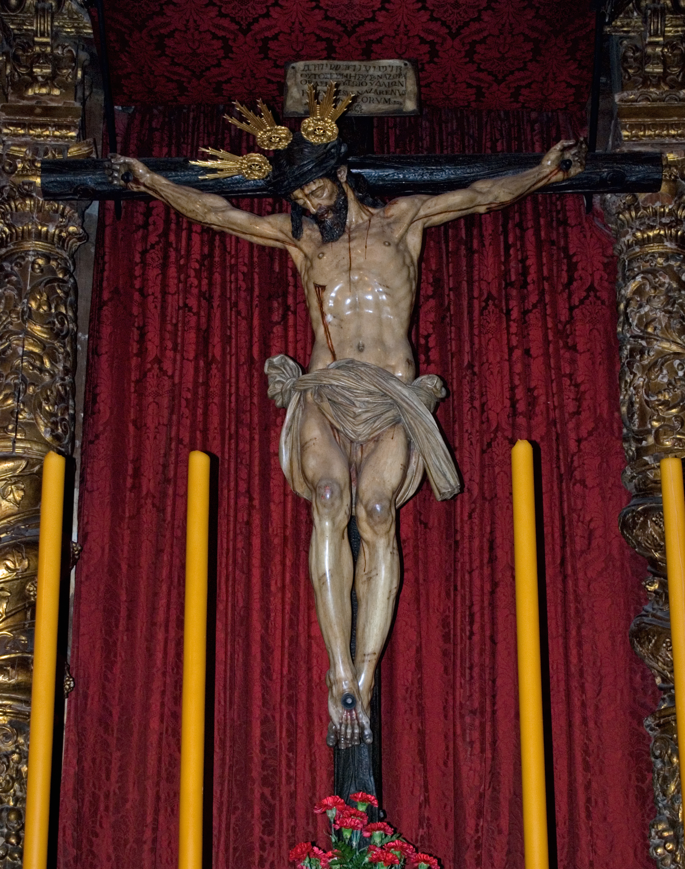 Imagen del Cristo del Calvario, autor Francisco de Ocampo, Iglesia de la Magdalena de Sevilla. Hermandad del Calvario (Semana Santa de Sevilla)